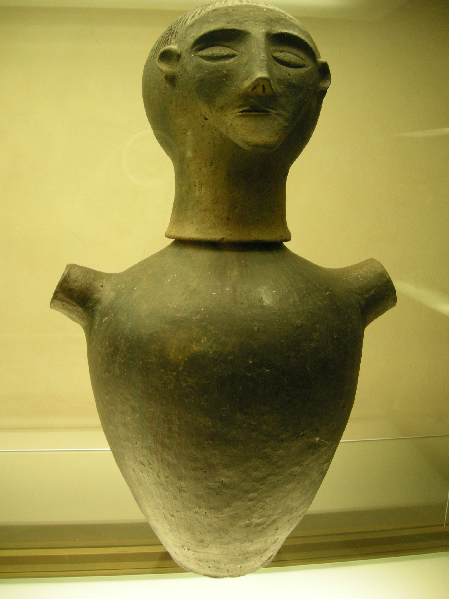 Cànopo etrusco da Chiusi, in terracotta, prima metà del VI sec. a.C., al Museo archeologico di Firenze.